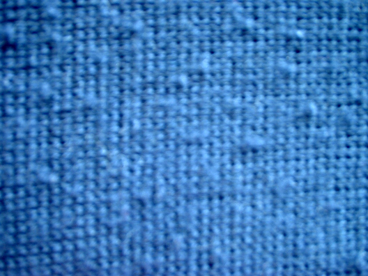 Maschenware mit Pilling